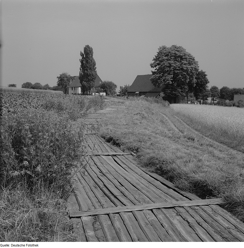 Original image description from the Deutsche Fotothek Freiberger Revier: Kunstgraben - Silbergraben - bei Großhartmannsdorf, Ortsausgang Richtung Freiberg (16. Jh)